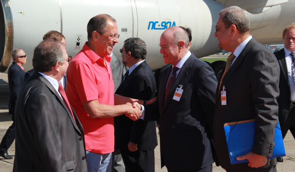 Начало визита Министра иностранных дел России С.В.Лаврова в Рио-де-Жанейро 11 июня 2013 г.